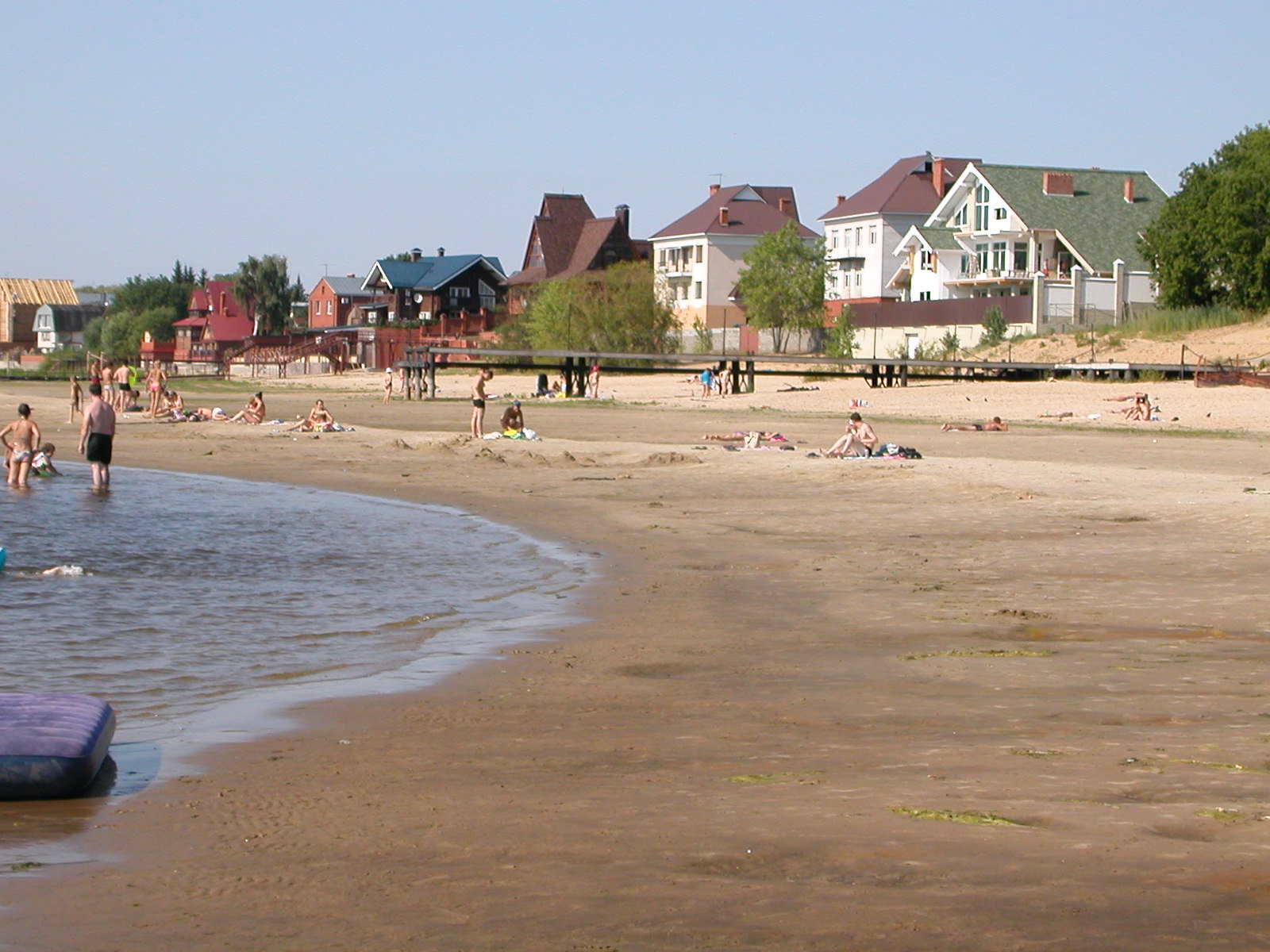 посёлок Боровое Матюшино, Лаишевский район Татарстана